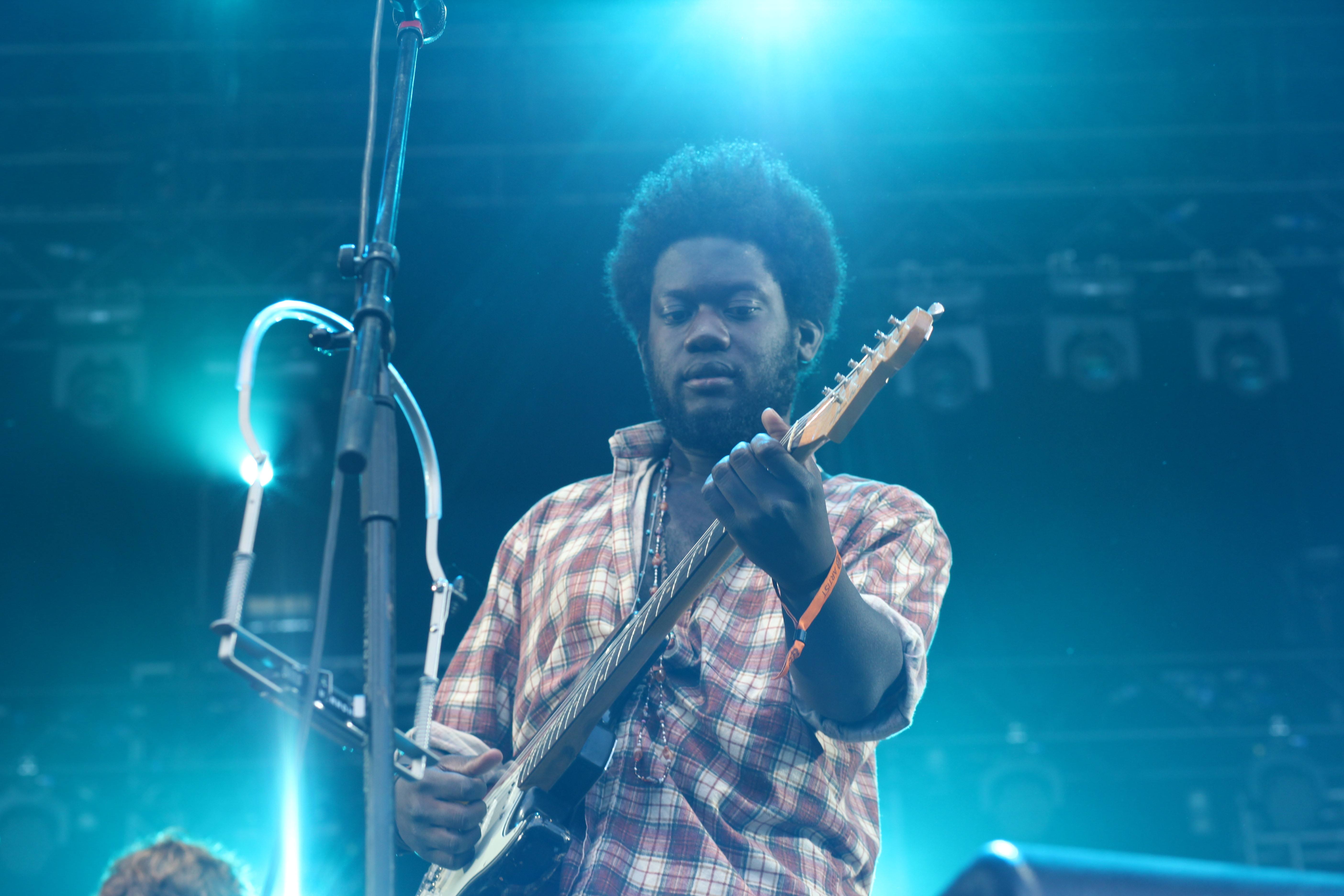 michael kiwanuka